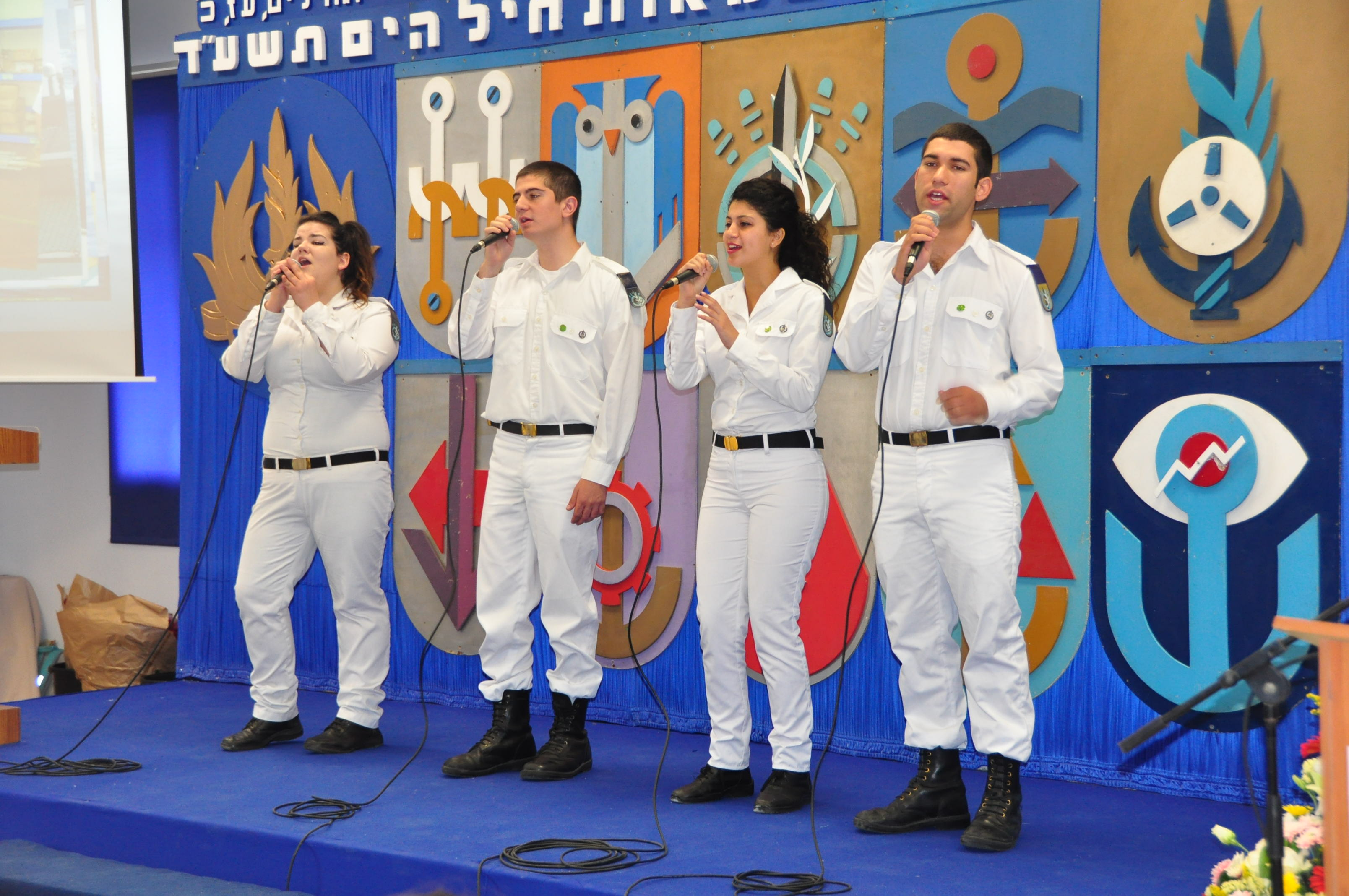 הופעה בכנס מצטייני חיל הים תשע"ד בבה"ד חיל הים